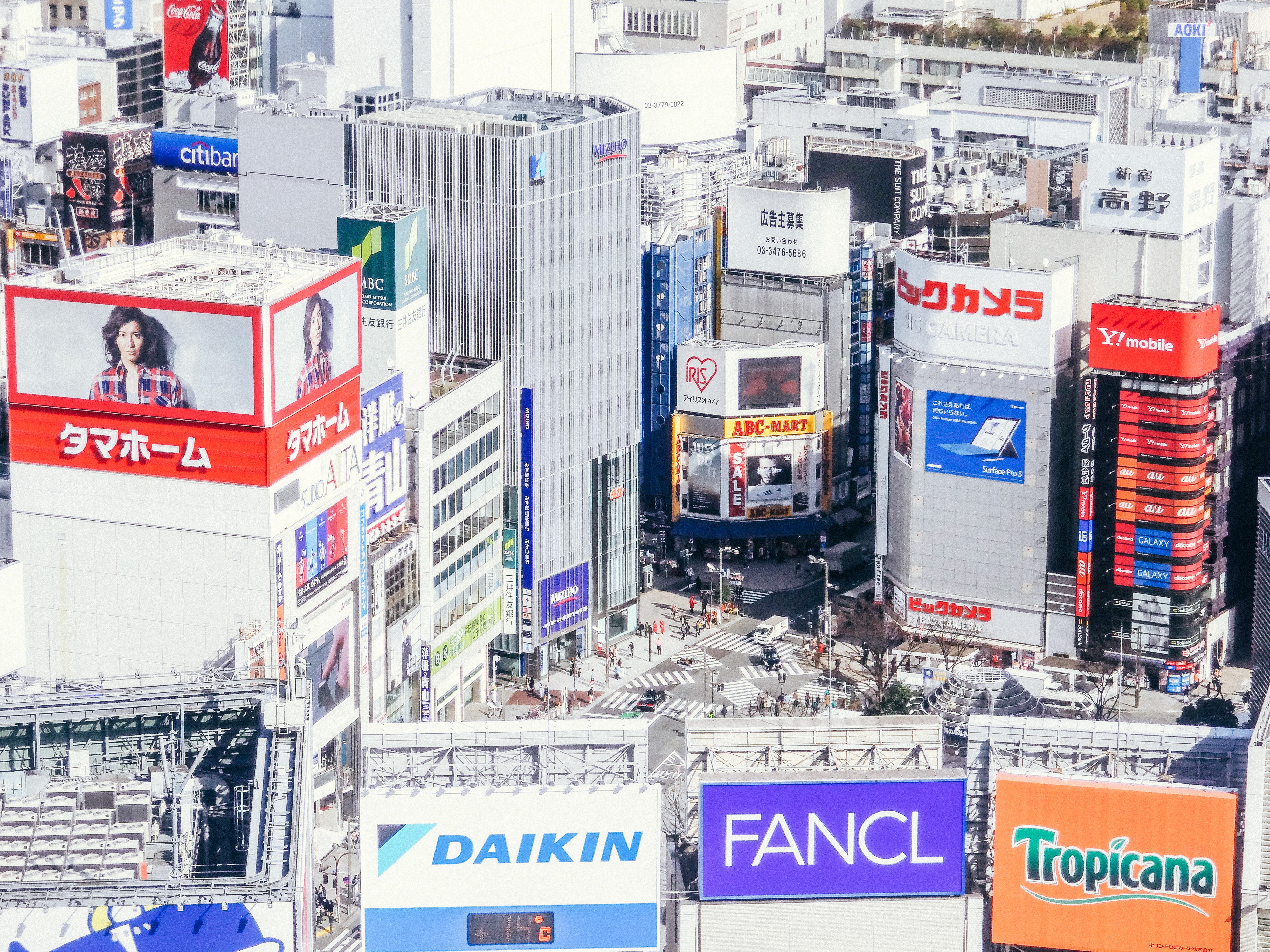 新宿駅東口